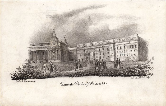 Беларуская (тарашкевіца): Палац вялікіх князёў літоўскіх у Вільні